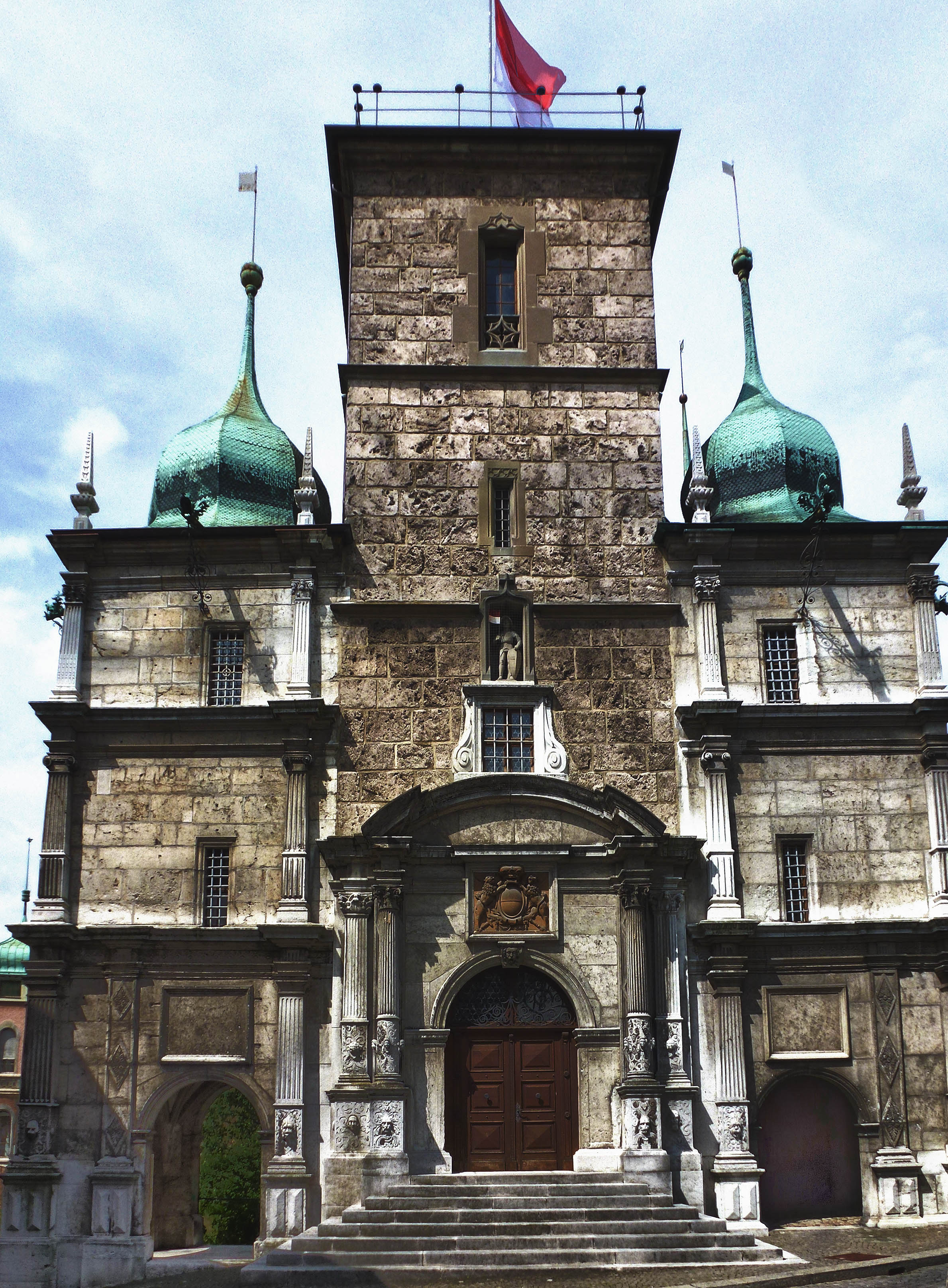 Das Rathaus in Solothurn. Mitten in der Altstadt.